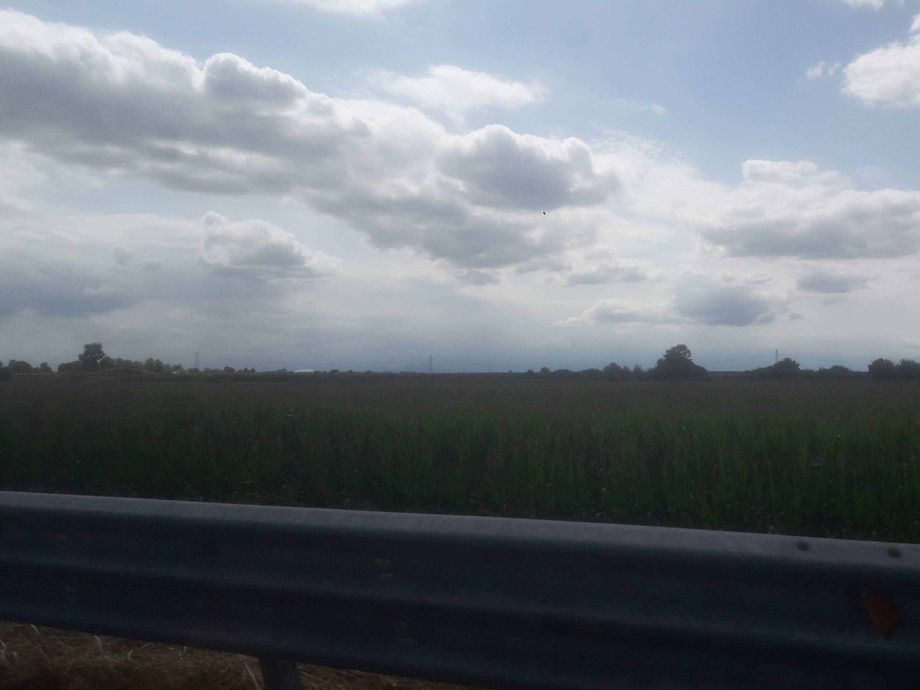 Tipica campagna piemontese nei dintorni di Bra (CN), in un pomeriggio di luglio.